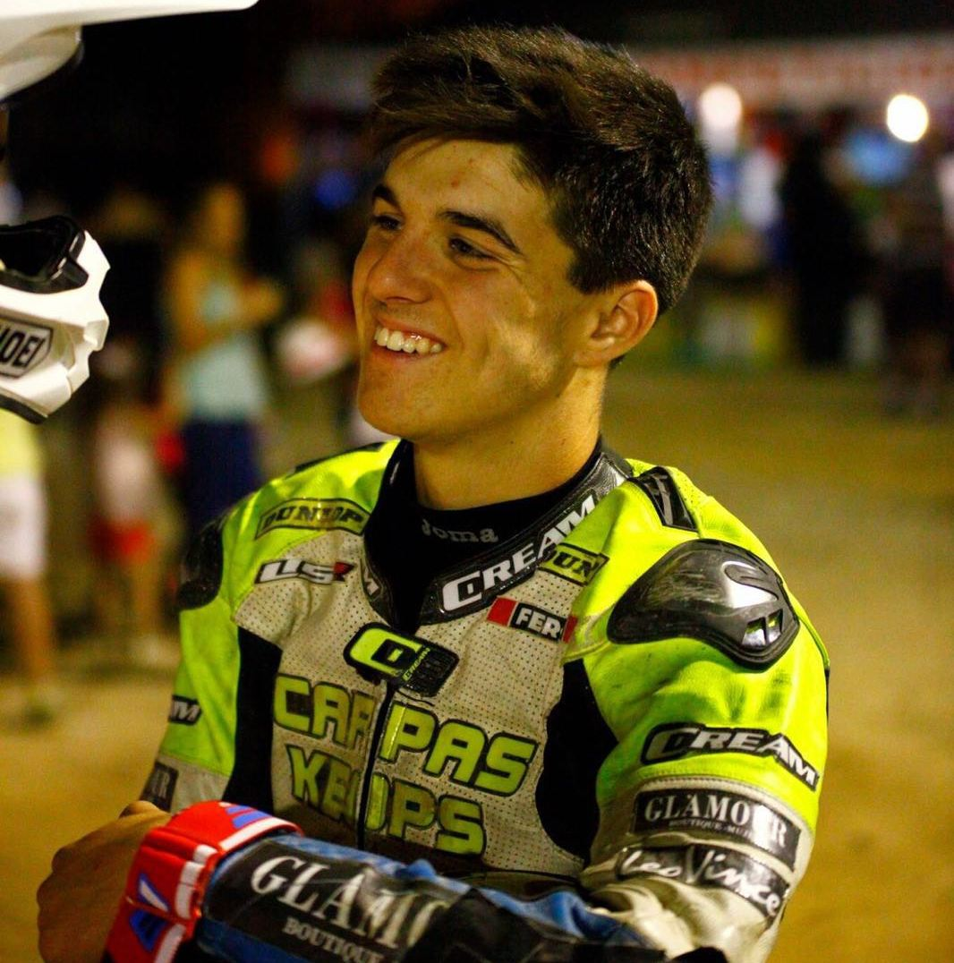 Marcos Ramírez en una prueba nocturna en el Los Palacion, Sevilla.